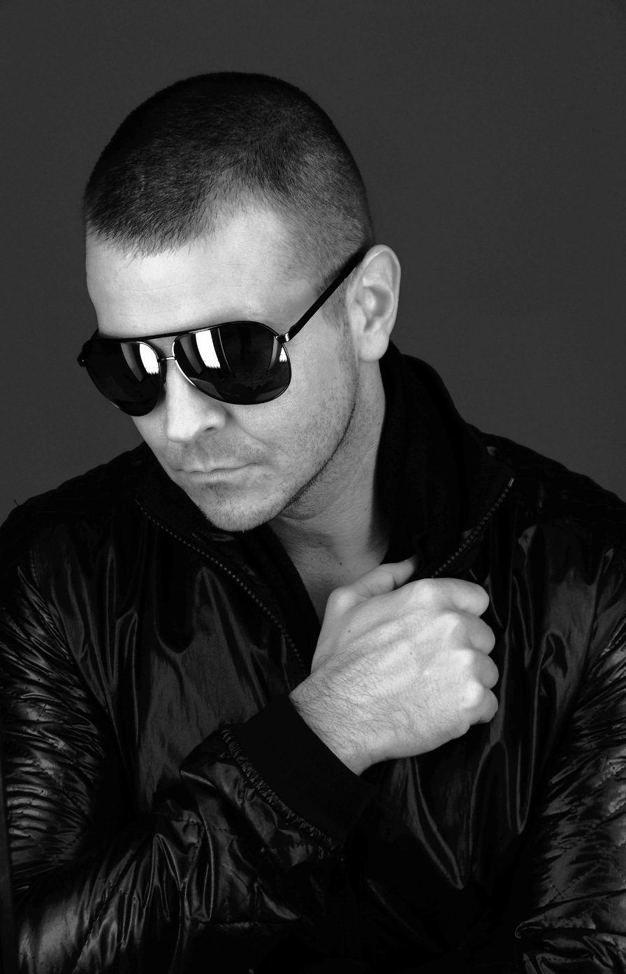 Moguai